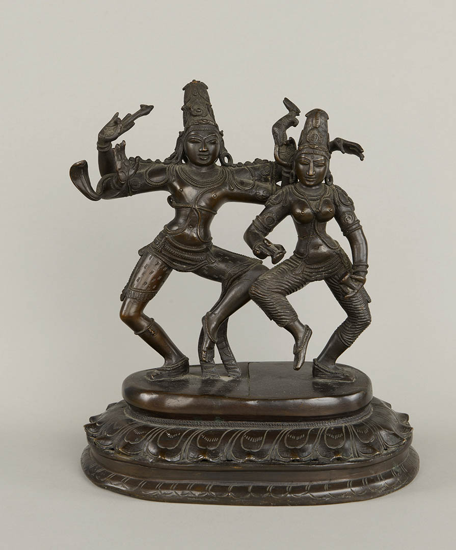 Rzeźba przedstawia parę tańczących bogów – Śiwę i Parwati w ujęciu frontalnym. Typ przedstawienia nryttamurti (tańczący), podtyp Umasahitamurti (Śiwa z Parwati). Śiwa jest czteroręki. Prawa przednia w geście opieki (abhaja mudra), z kobrą zawiniętą w zgięciu łokcia jak bransoleta (bhudźanga walaja, sarpa walaja). Prawa tylna zgięta w łokciu, w skierowanej do góry dłoni w pozycji kartari hasta znajduje się dłuto (tanka). Lewa przednia zgięta w łokciu, w skierowanej do góry dłoni w pozycji kartari hasta znajduje się jelonek (paśu, mryga), trzymany za tylne nogi, z korpusem skierowanym w lewo, głową w prawo. Lewa tylna ręka wyprostowana w bok w pozycji gadźa hasta (danda hasta). Parwati ma dwie ręce, w dłoniach trzyma czynele (sanskr. karatala, tamil. kalam).